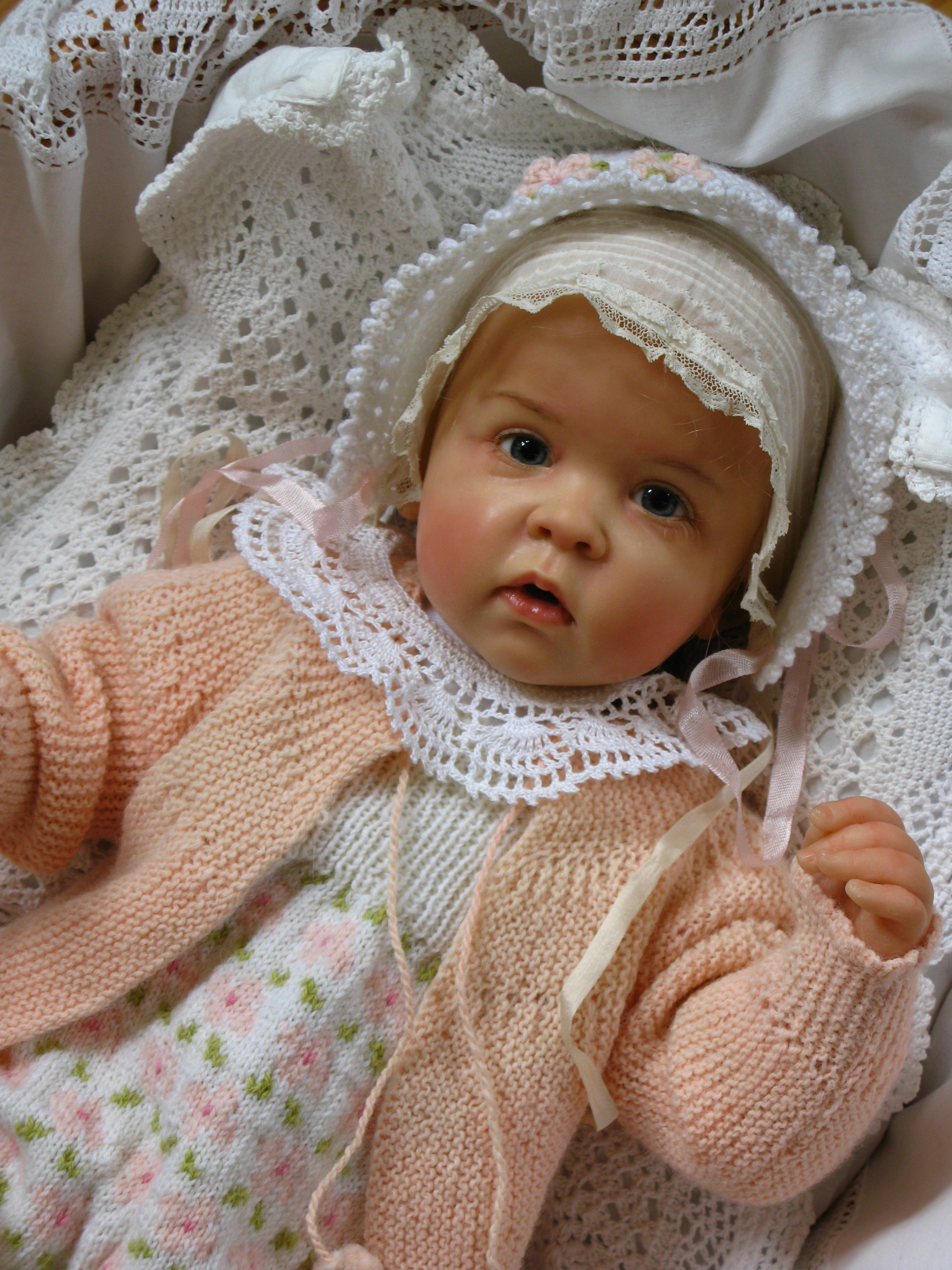 Dukke (unika) modellert av Sissel Bjørstad Skille. Dukken er ca 50 cm lang